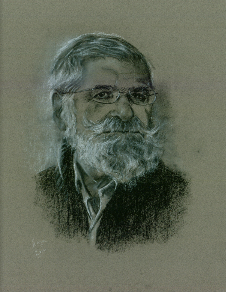 יואל נץ צלם, ממציא בתחום הטכנולגיה של הצילום